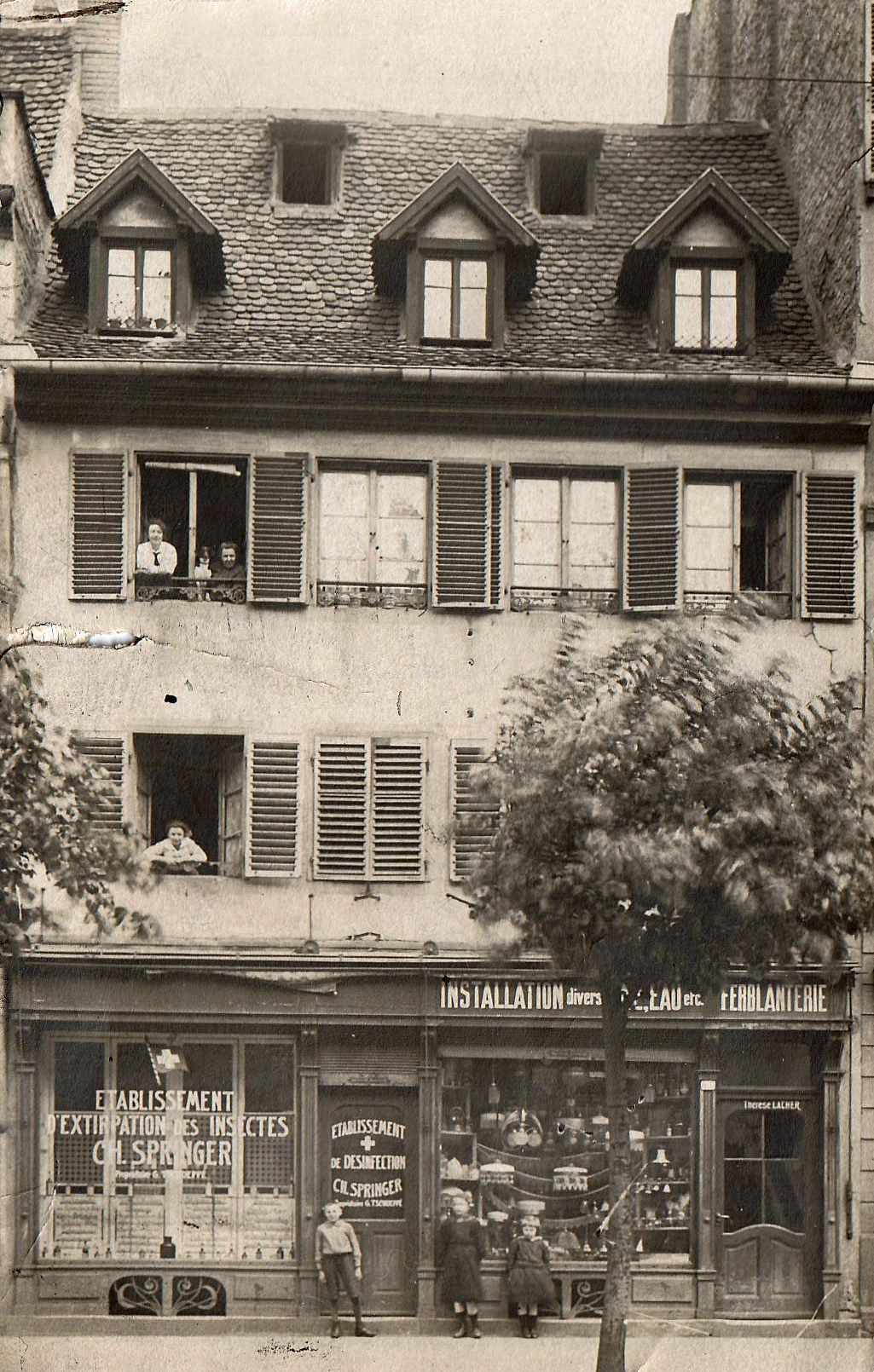 Strasbourg : 38 rue du Faubourg-de-Saverne en 1920. Etablissement d'extirpation des insectes Ch. Springer. Propr. Georges Tschoeppé.